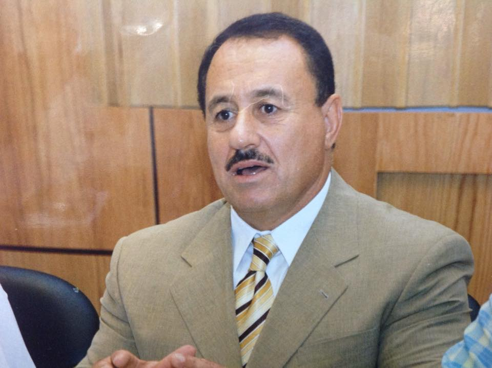 كابتن عزيز عبد الكريم